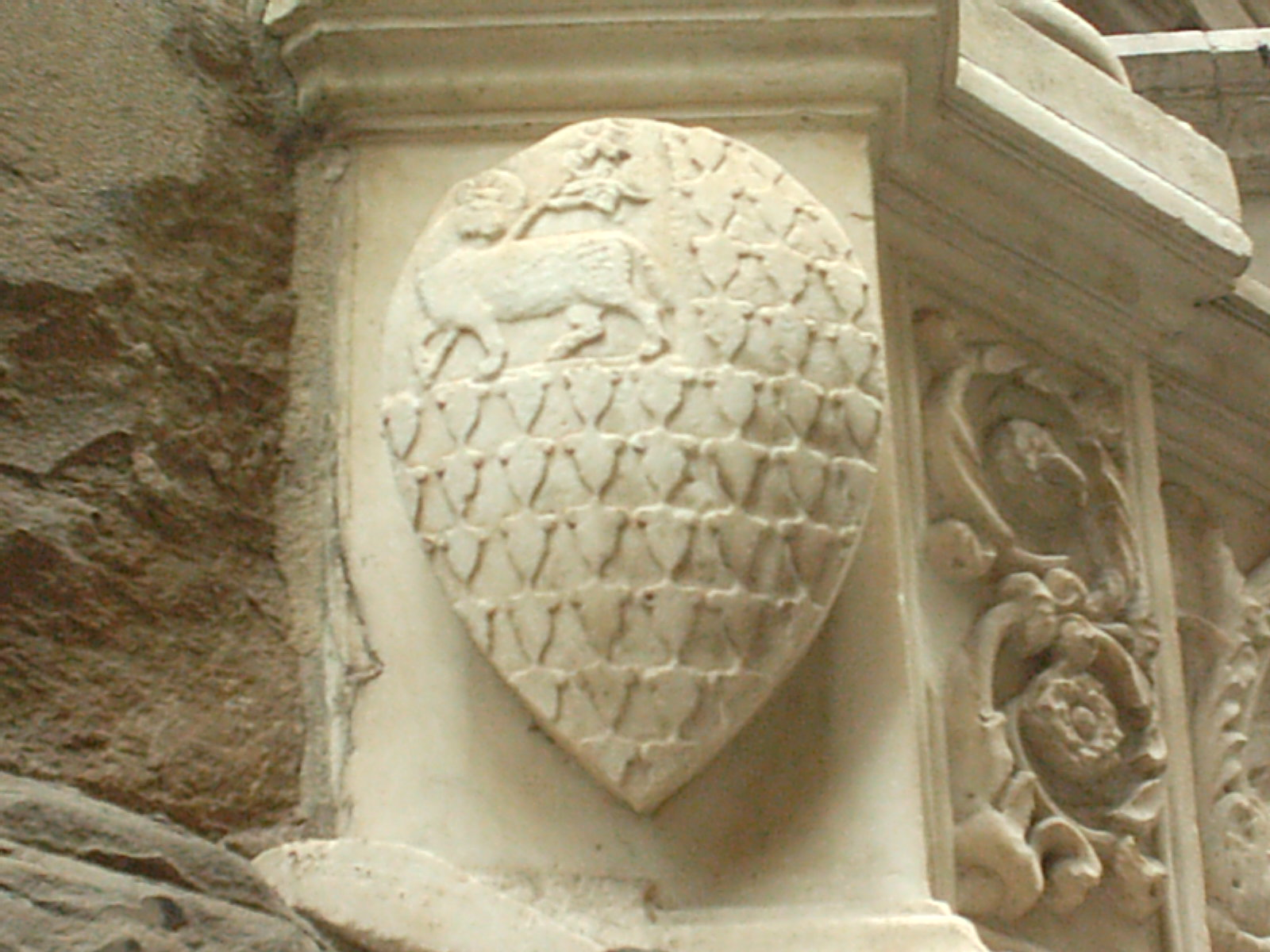 Stemma dell'arte dei Vaiai e Pellicciai sul tabernacolo della chiesa di Orsanmichele a Firenze.